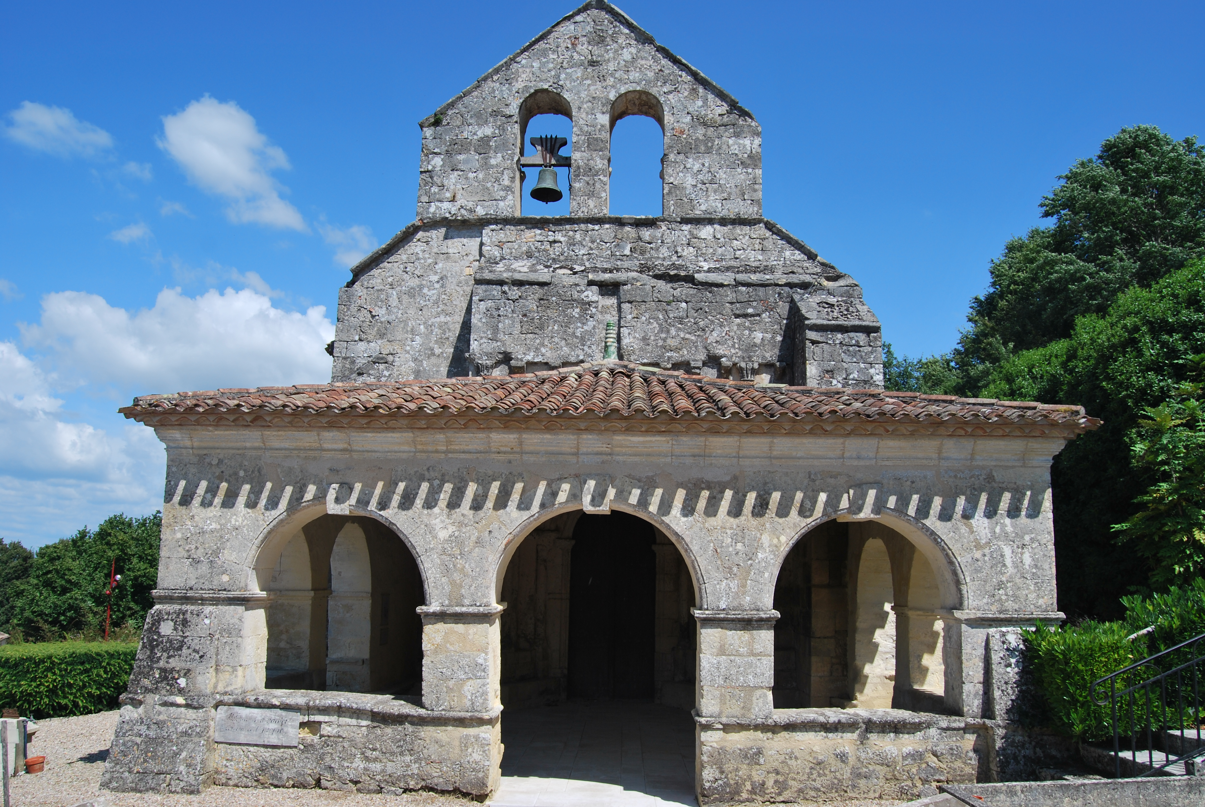 Église de Sainte-Florence